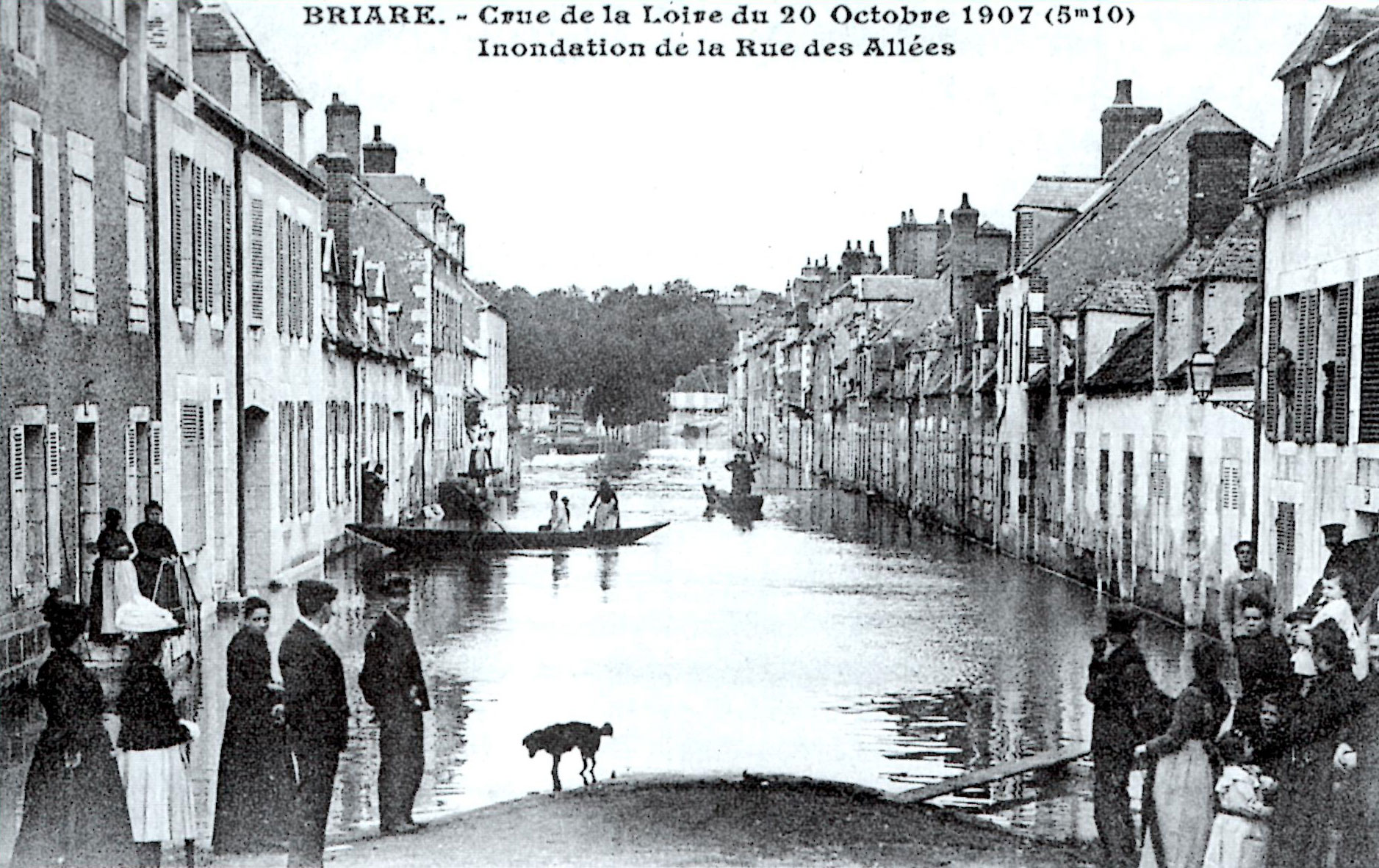 Crue de la Loire de 1907 - Commune de Briare, Loiret, France